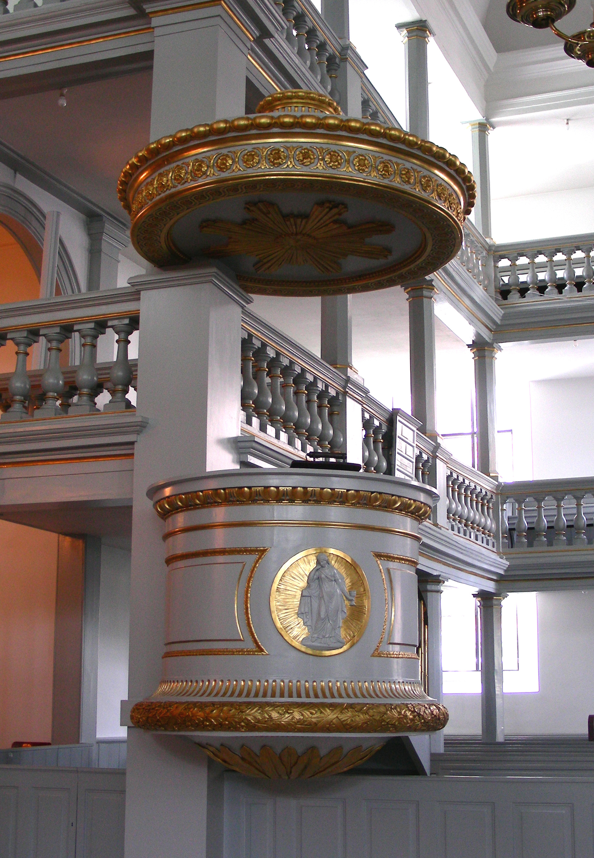 Garnisons Kirke (Garrison Church), Copenhagen, Denmark. Pulpit.